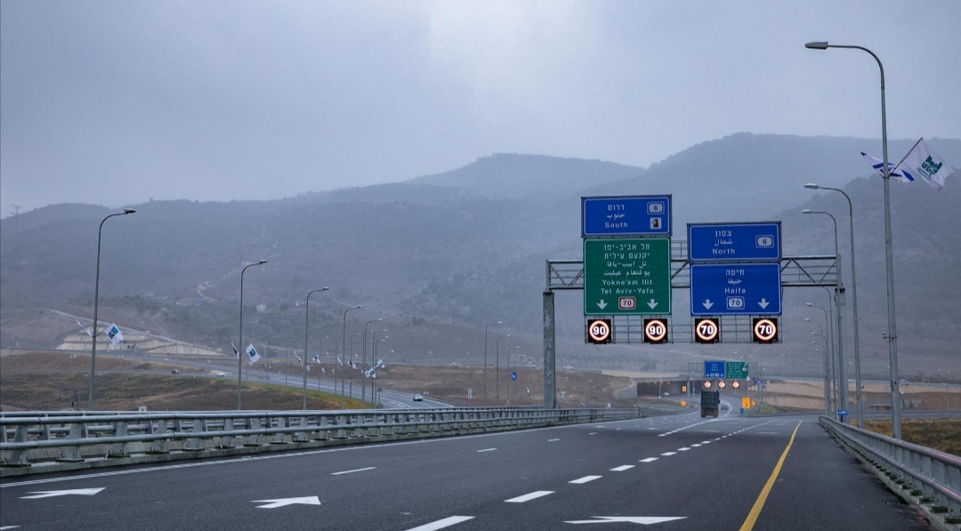 מחלף תל קשיש מכיוון כביש 77